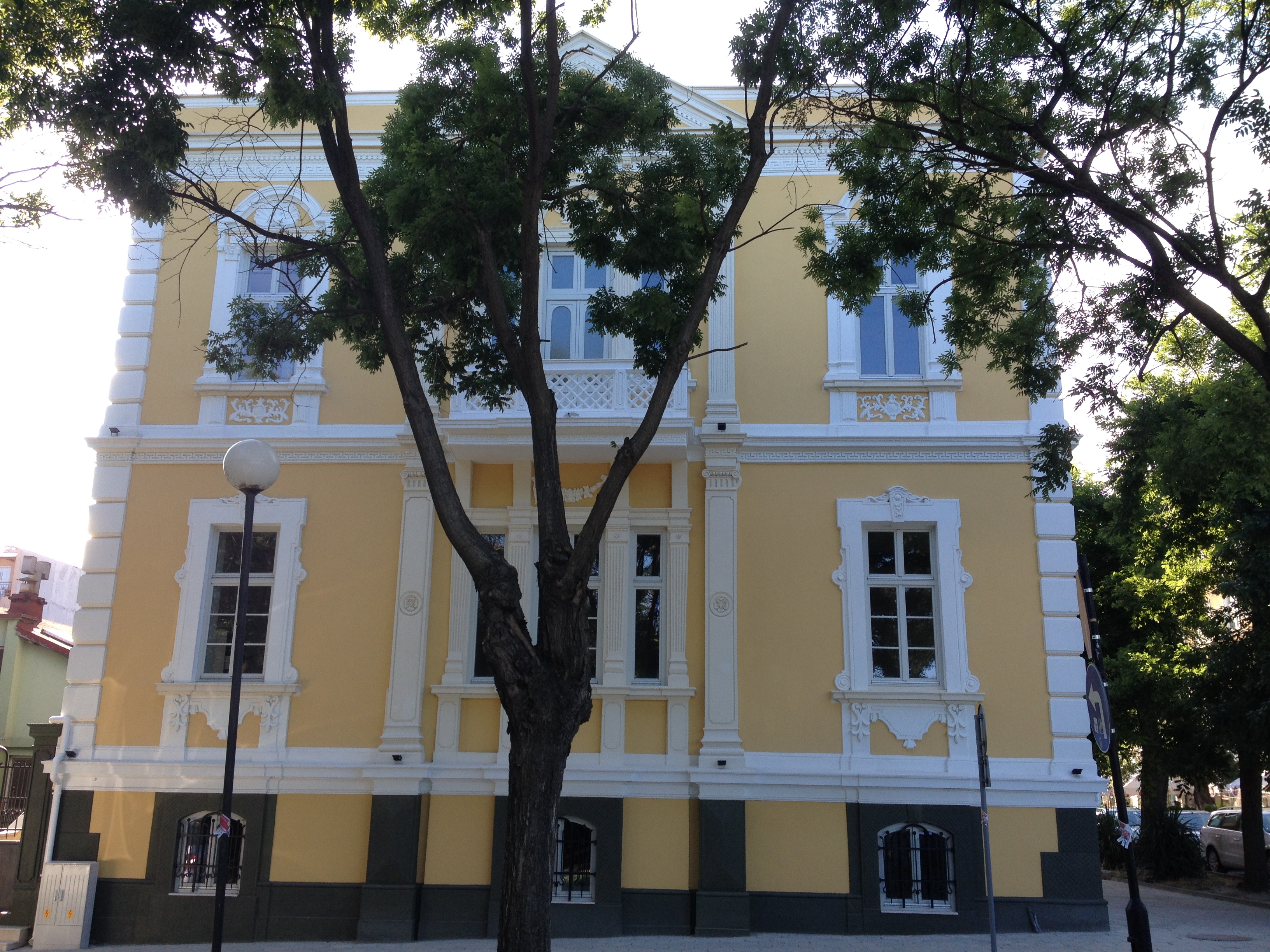 Burgas, Bulgarien: ehemaliges deutsches Pestalozzi-Gymnasium in der Alexander Batemberg Str. 28 (zwischen 1921-1935), zwischen 1935-1945 Italienische Gesamtschule